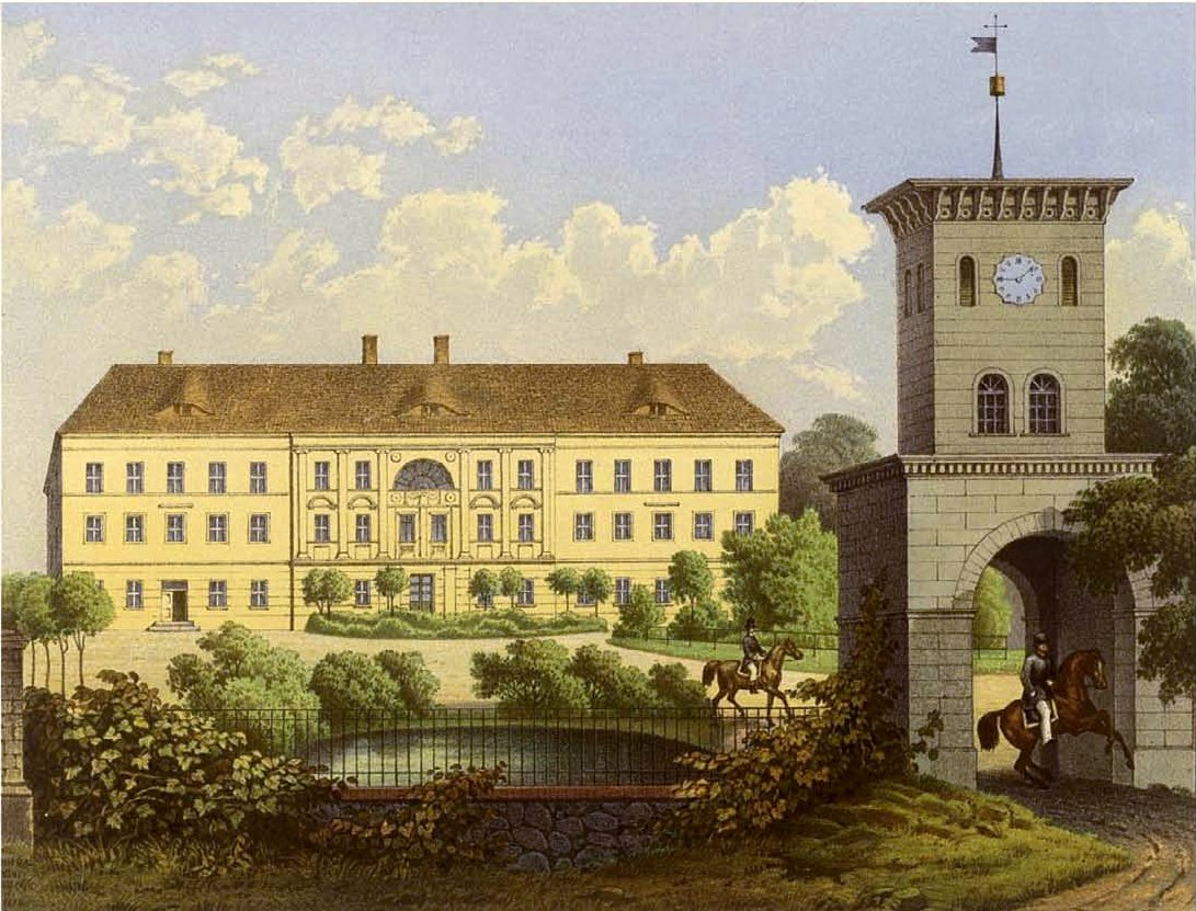 Gut Cremzow Kreis Pyritz